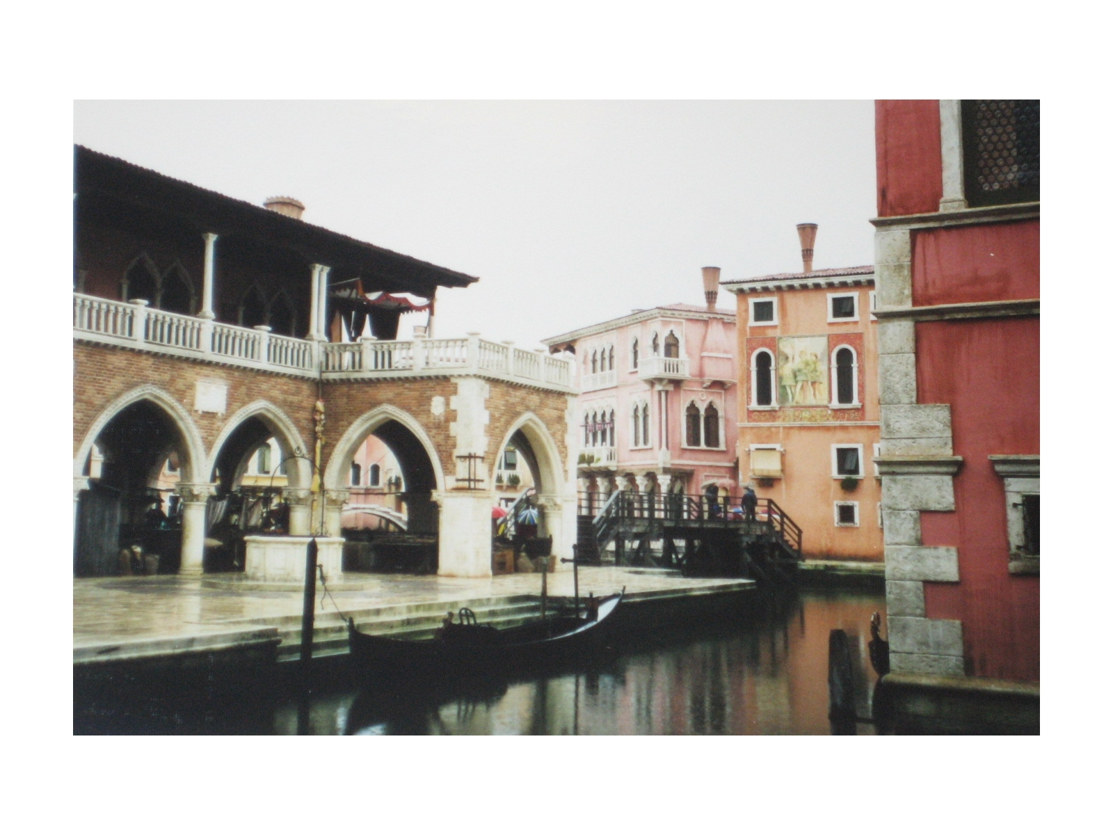 De Filmset vum Film "Secret Passage", deen am Venedeg vum 15./16. Joerhonnert spillt. De Set war 2001 zu Esch-Uelzecht op der Industriefriche vun Terre Rouge opgeriicht ginn. D'Foto ass bei enger Porte ouverte, am September 2001, gemaach ginn.